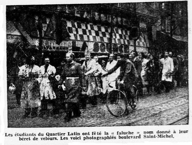 La faluche fêtée au quartier latin en 1938